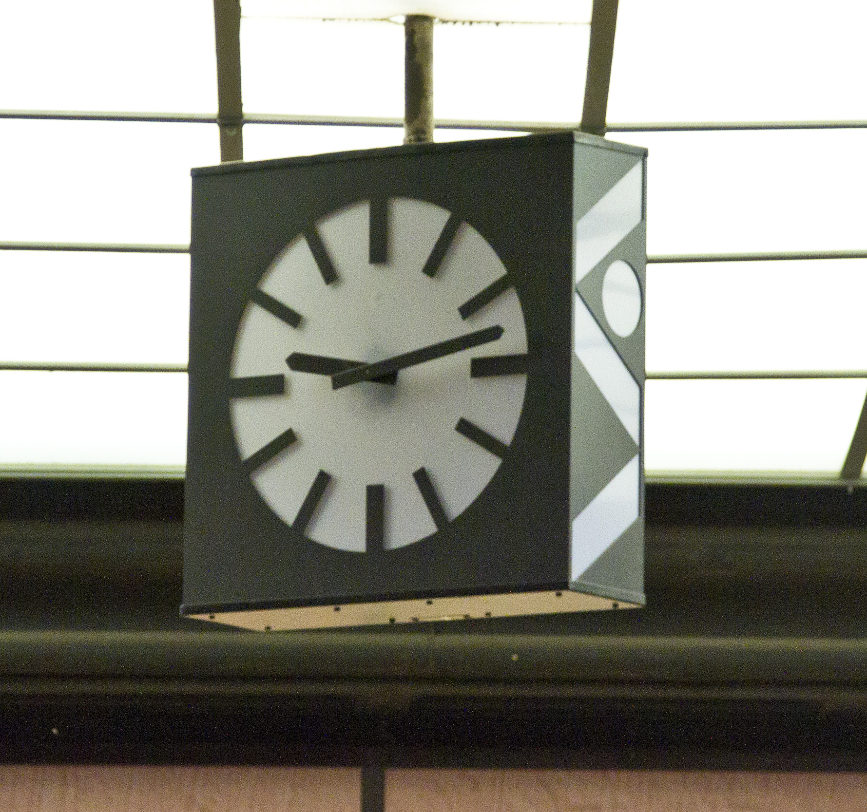 Stockmannin pääsisäänkäynnin yläpuolella sijaitseva kello kesällä 2013.